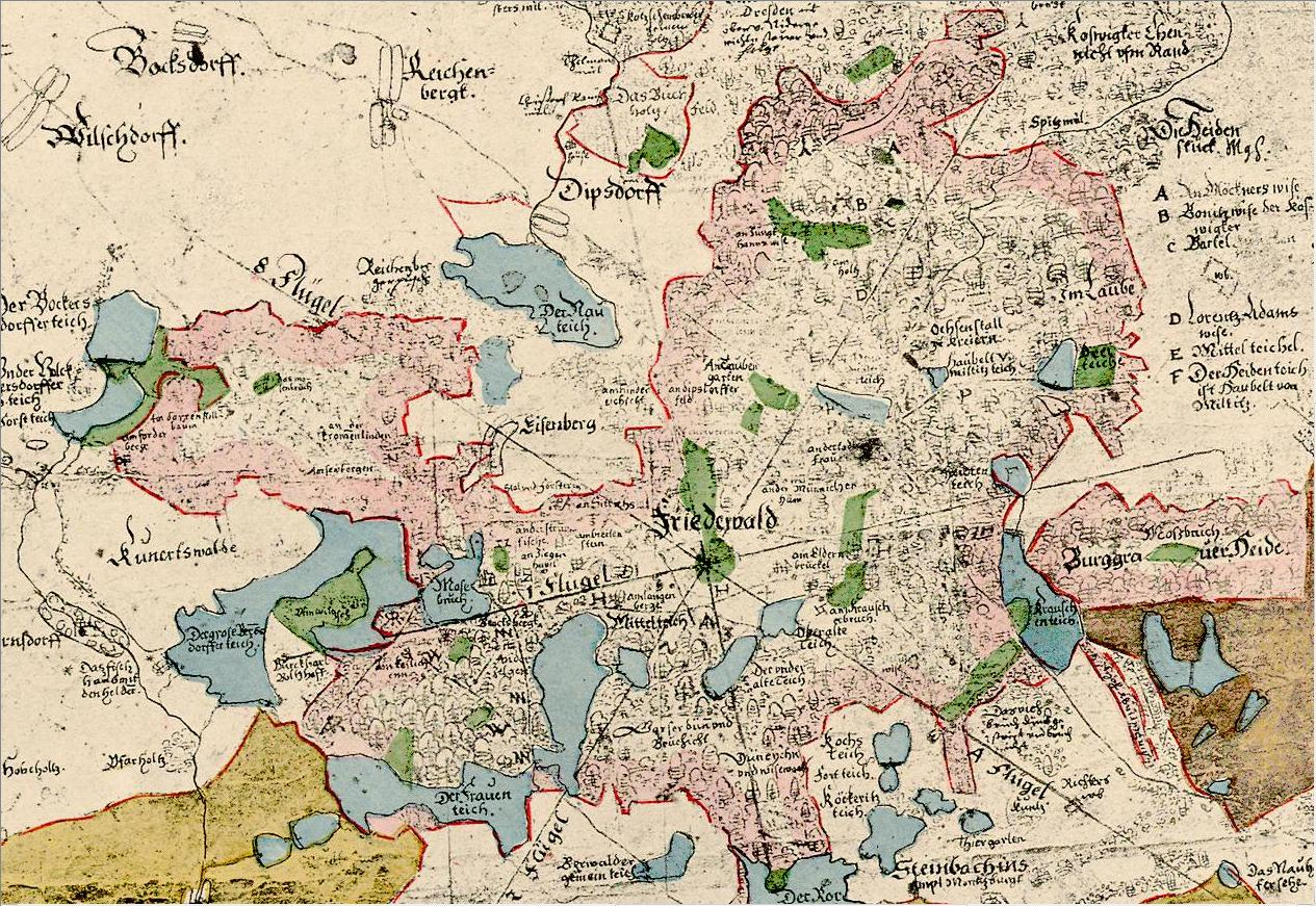 Ausschnitt von Tafel IX aus Oeder, Matthias: Die erste Landesvermessung des Kurstaates Sachsen auf Befehl des Kurfürsten Christian I., ausgeführt von Matthias Oeder (1586-1607); zum 800-jährigen Regierungs-Jubiläum des Hauses Wettin. Stengel & Markert, Dresden 1889.